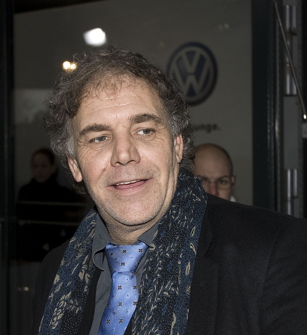 Christian Kohlund, Volkswagen People’s Night